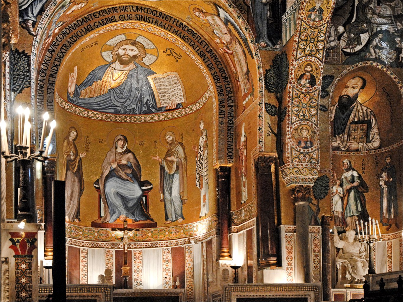 L'abside tournée vers l'Orient est dominée par le Christ Pantocrator au-dessus de la Vierge, Le Vierge est entourée de Madeleine, Jean-Baptiste, Gabriel, Michel, Jacques, Pierre. Dans l'abside de droite Saint Paul L'intérieur de la chapelle est de style byzantin, il date de la fin de la décennie 1130, jusque dans les années 1150-1160 Au Xe siècle, la Sicile est rattachée au califat fatimide du Caire. L’île reste sous domination musulmane jusqu’à l’arrivée des Normands, qui, en 1059, obtiennent la souveraineté des mains de la Papauté décidée à rechristianiser des territoires que Byzance n’était plus capable de reconquérir. La conquête normande s’échelonne entre 1060 à 1090. Finalement, en 1130, Roger II (1130-1154) obtient la couronne de l’antipape Anaclet II (1130-1138) et rassemble les territoires normands en un royaume, choisissant naturellement Palerme comme capitale. Il y fait construire un palais et, dans celui-ci, un riche édifice cultuel, la Chapelle palatine, qui, par son architecture et son décor, demeure un exemple exceptionnel de métissage des arts chrétiens d’Orient et d’Occident, et d’art islamique. Article de Qantara sur la chapelle palatine Article de Wikipedia sur le palais des Rois Normands